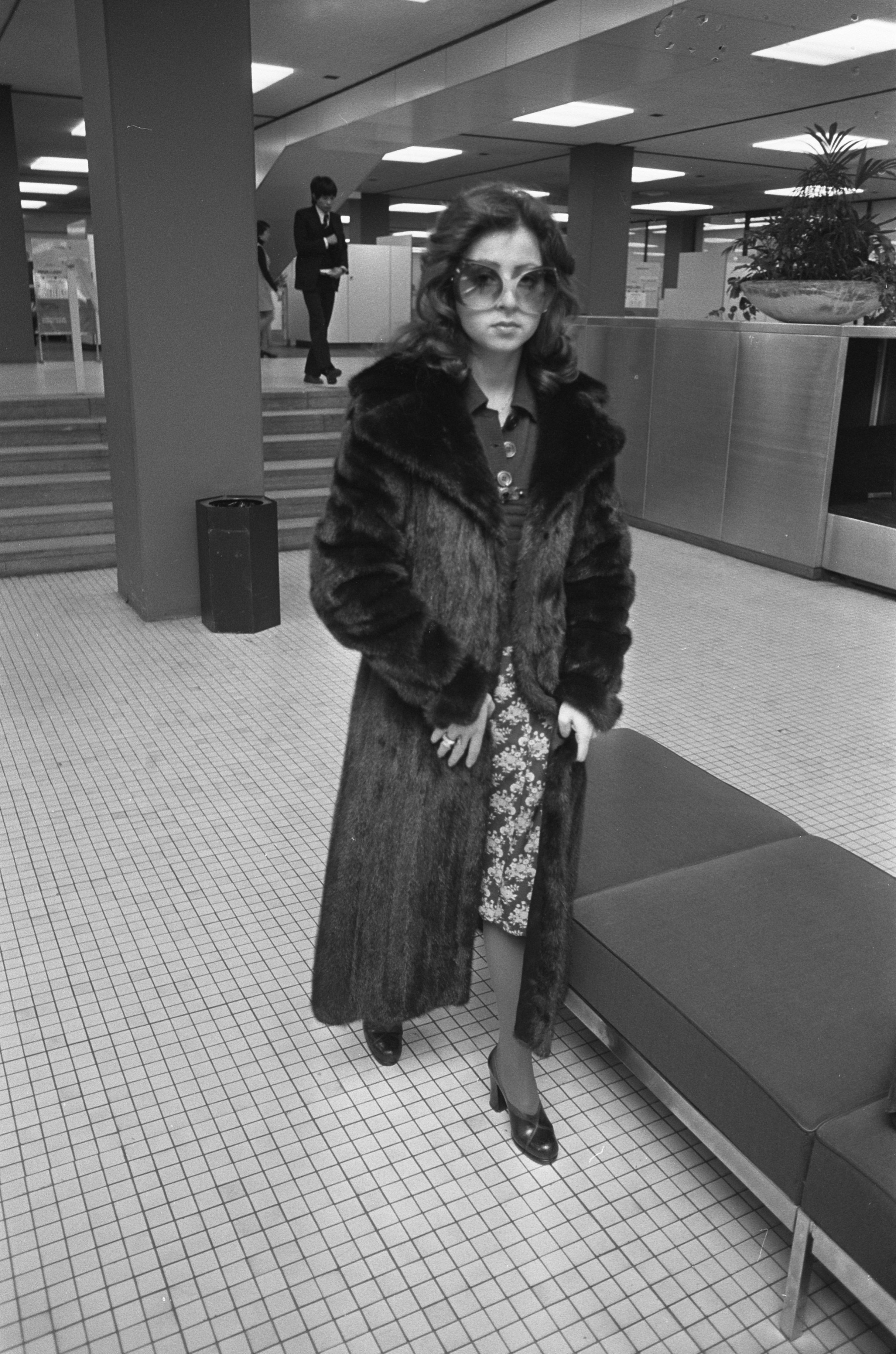 Collectie / Archief : Fotocollectie Anefo Reportage / Serie : [ onbekend ] Beschrijving : Zangeres Vicky Leandros op Schiphol Datum : 8 november 1973 Locatie : Noord-Holland, Schiphol Trefwoorden : zangeressen Persoonsnaam : Leandros, Vicky Fotograaf : Peters, Hans / Anefo Auteursrechthebbende : Nationaal Archief Materiaalsoort : Negatief (zwart/wit) Nummer archiefinventaris : bekijk toegang 2.24.01.05 Bestanddeelnummer : 926-8115